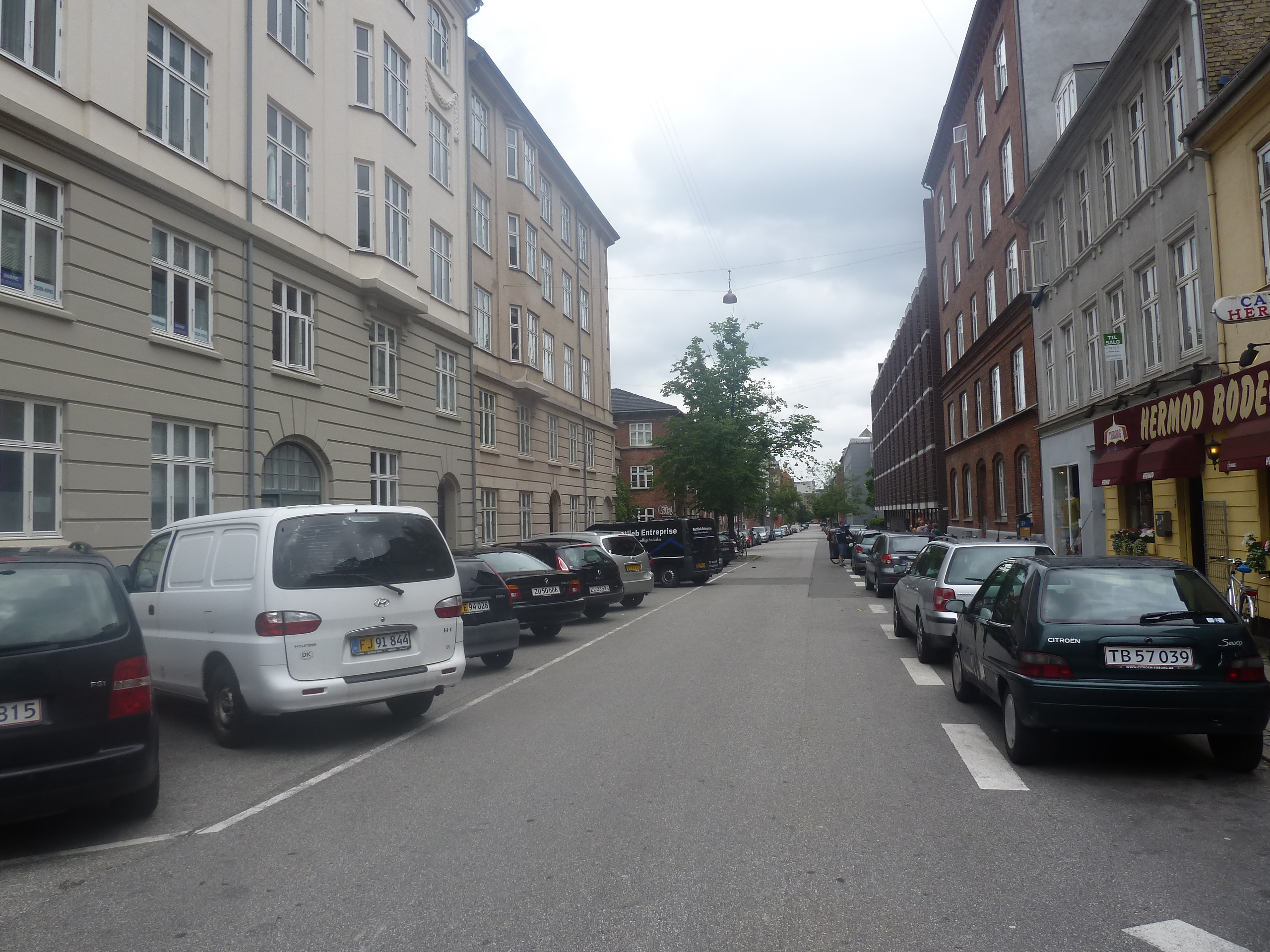 The street Vordingborggade in Østerbro in Copenhagen.